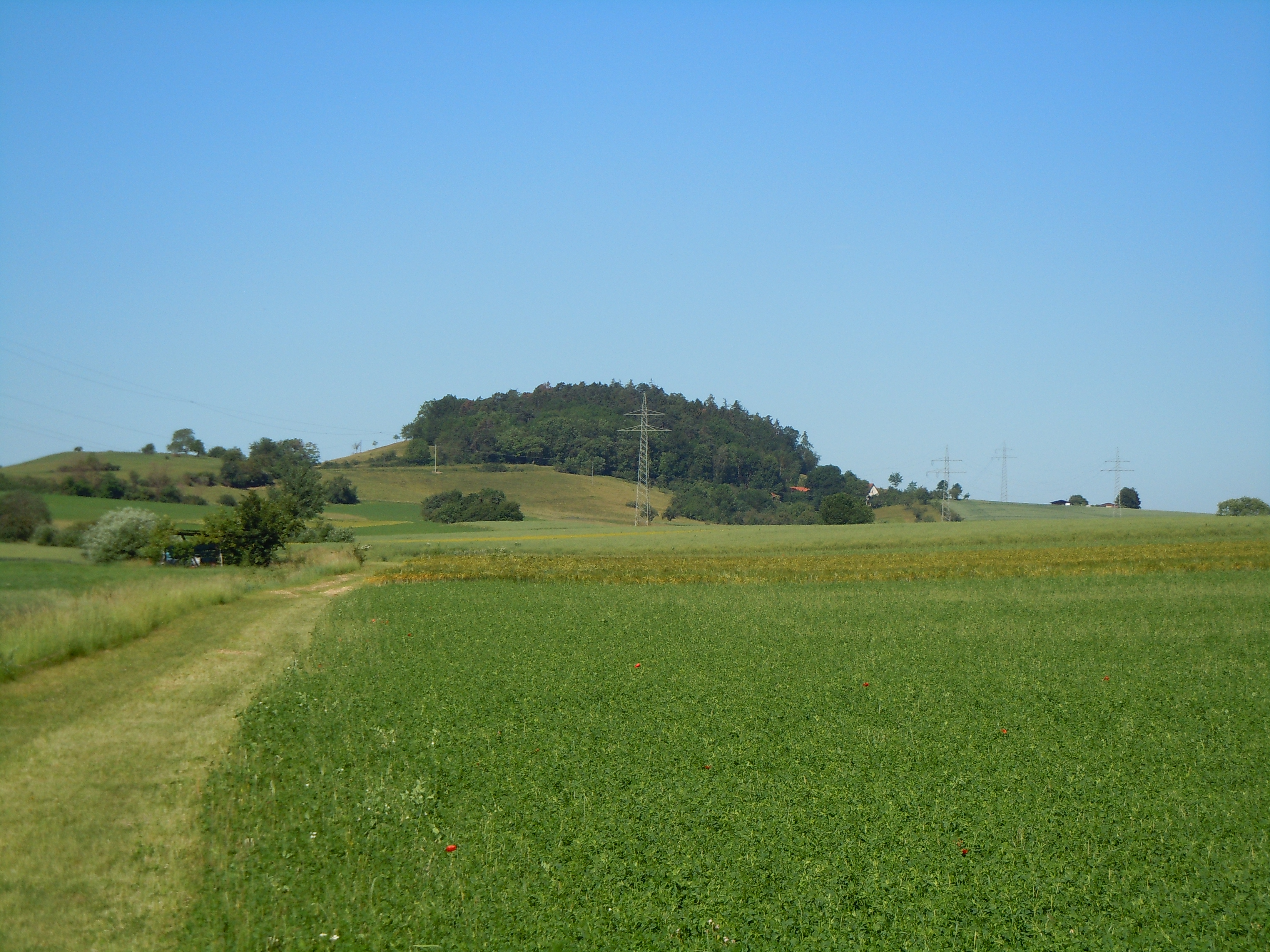 Heuberg bei Rottenburg am Neckar, Blick nach Südwest